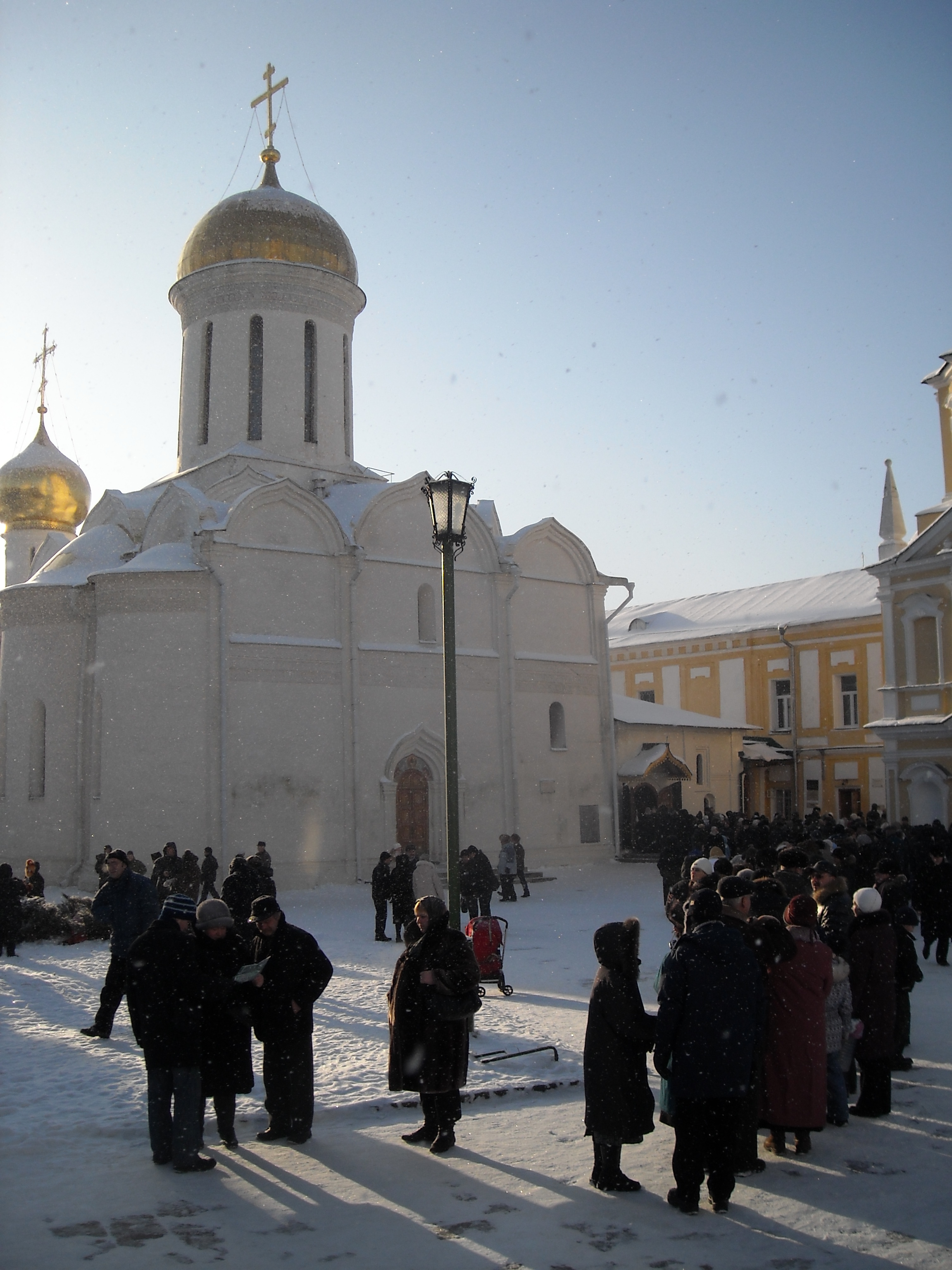 Очередь к прп. Сергию